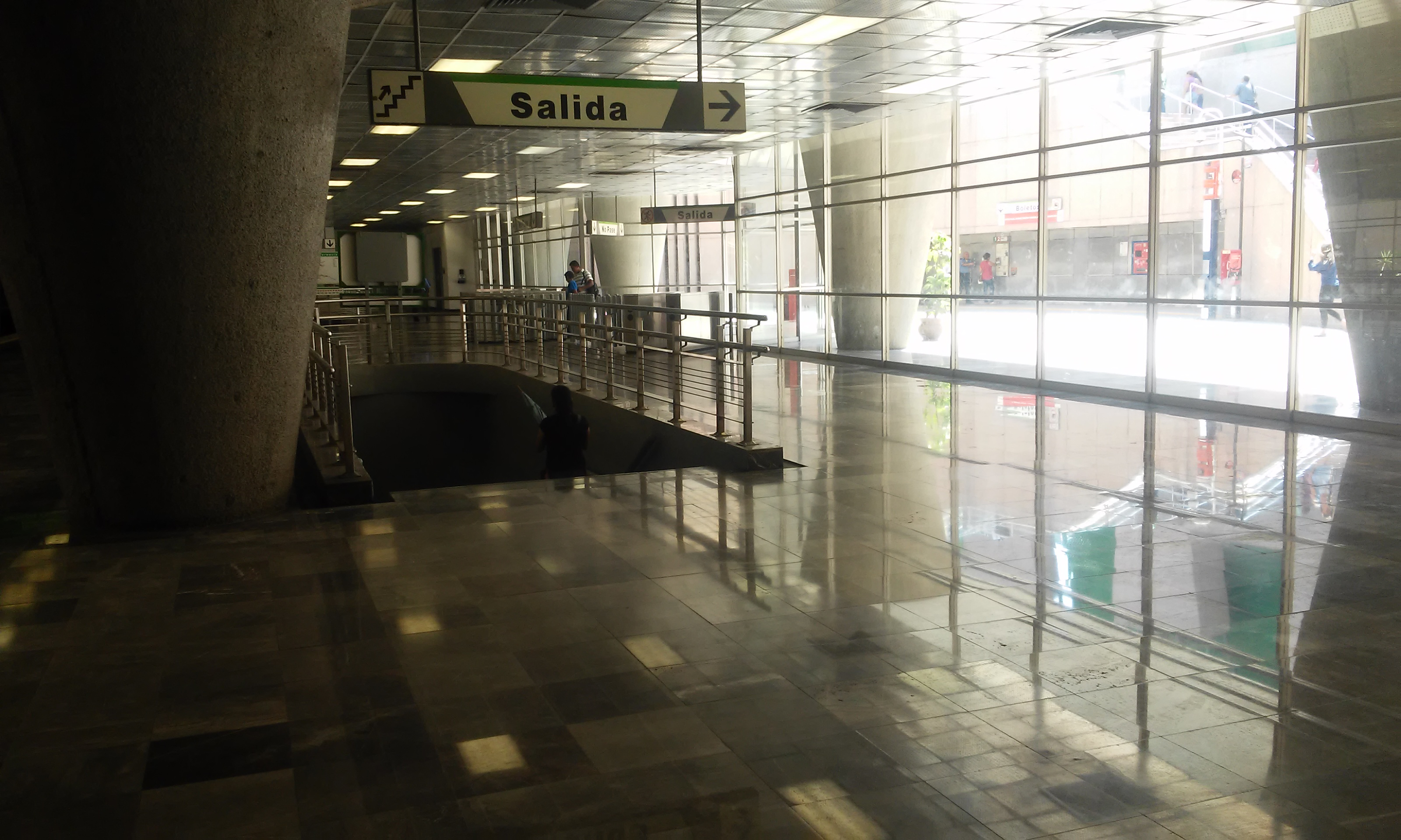 Interior de la estación Alameda